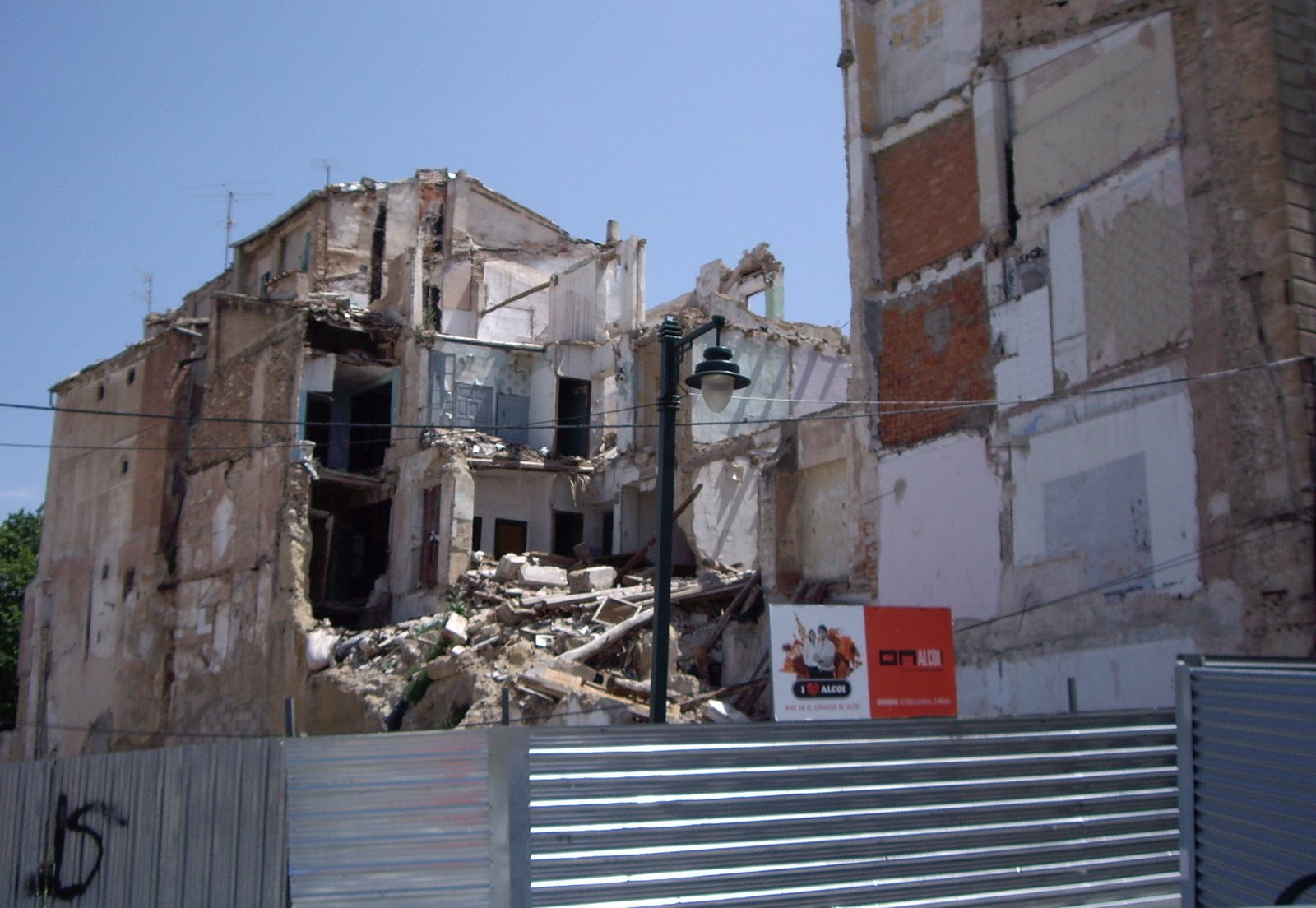 Estat actual de moltes zones del barri del centre d'Alcoi